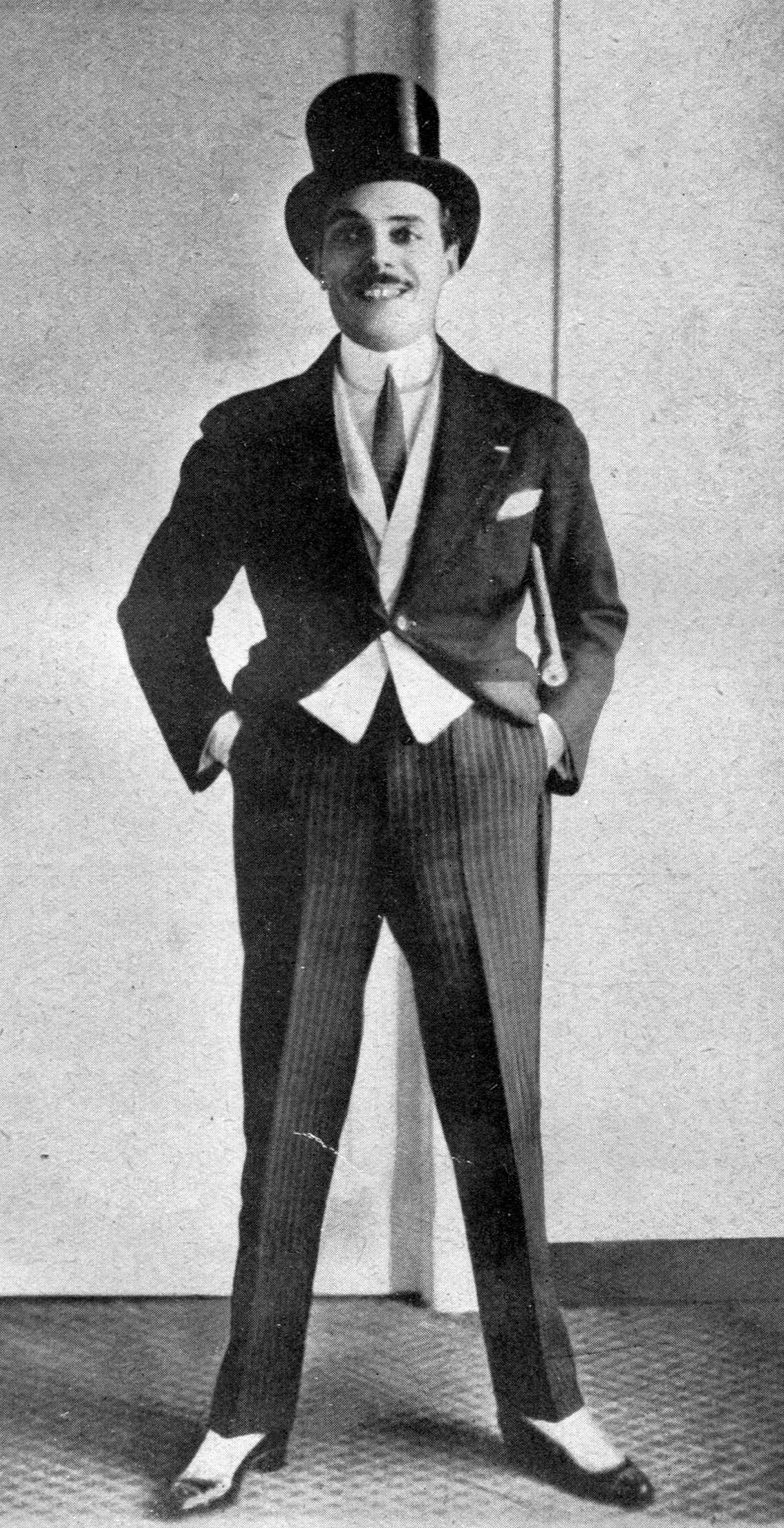 L'attore Mx Linder - immagine del 1908